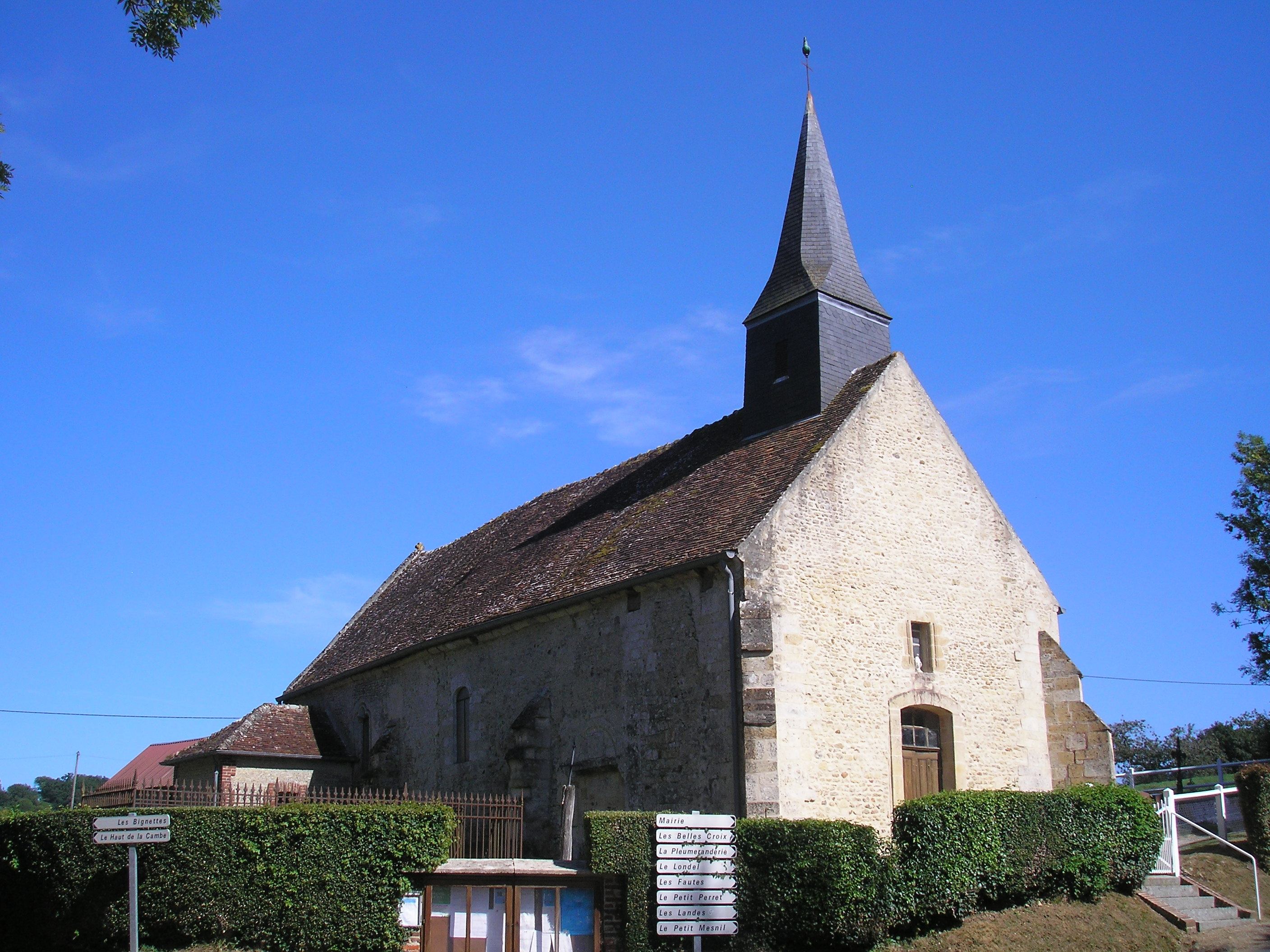 Montreuil-la-Cambe (Normandie, France). L'église Saint-Michel de La Cambe.